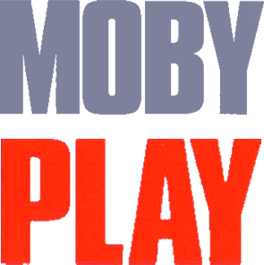 Logo del álbum Play de Moby